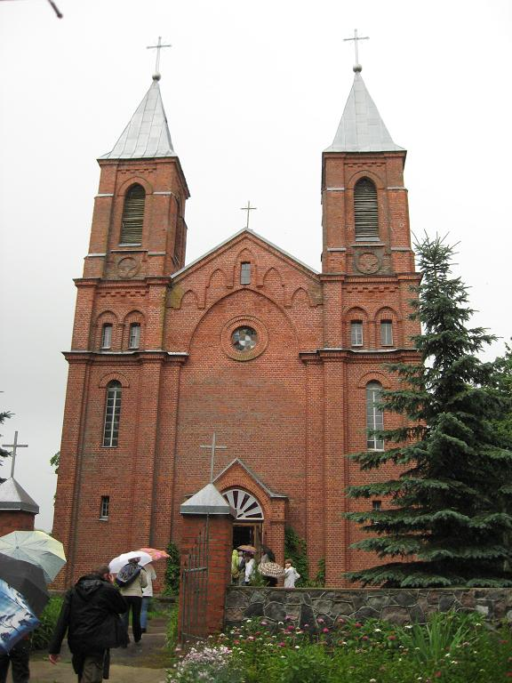 Мілюнцы. Касцёл Святога Якуба